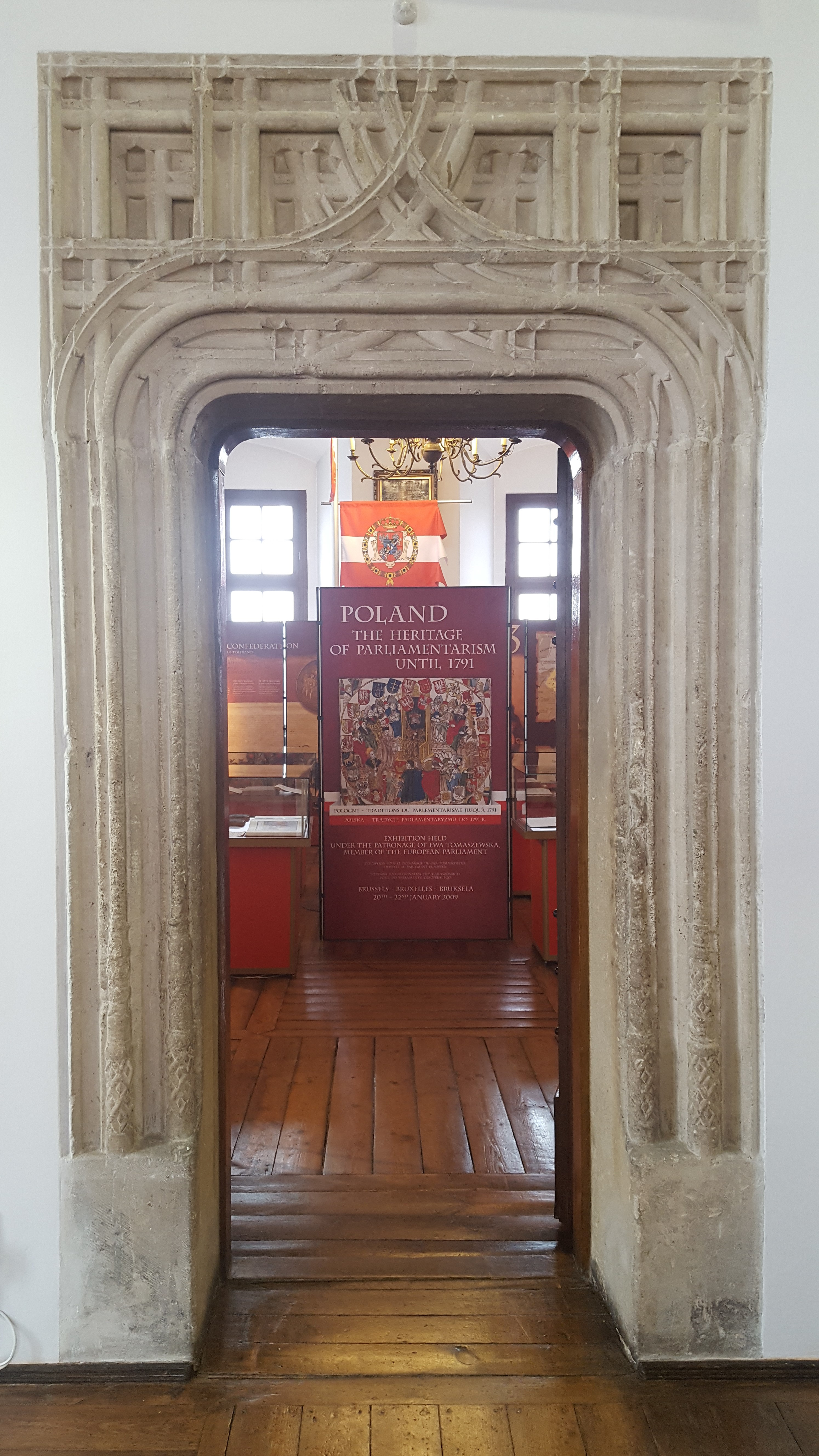 Portal gotycki z pocz. XVI wieku w wieży królewskiej w Piotrkowie.